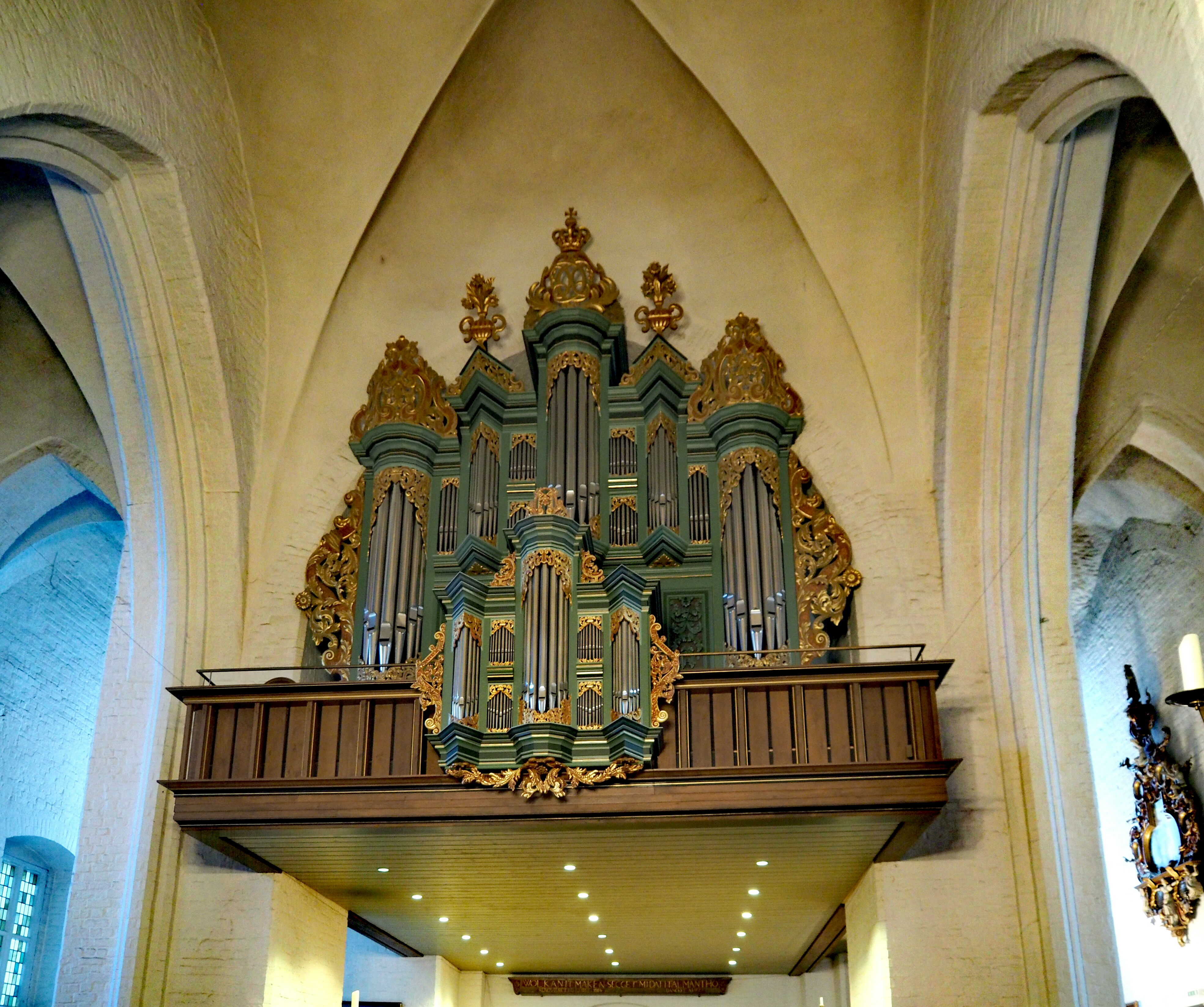 Orgel i Vor Frue Kirke i Flensborg med Christian VI af Danmark og Norges spejlmonogram